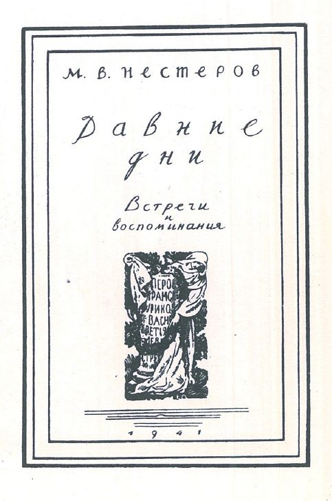 Книжная графика Евгений Евгеньевича Лансере (1875-1946)